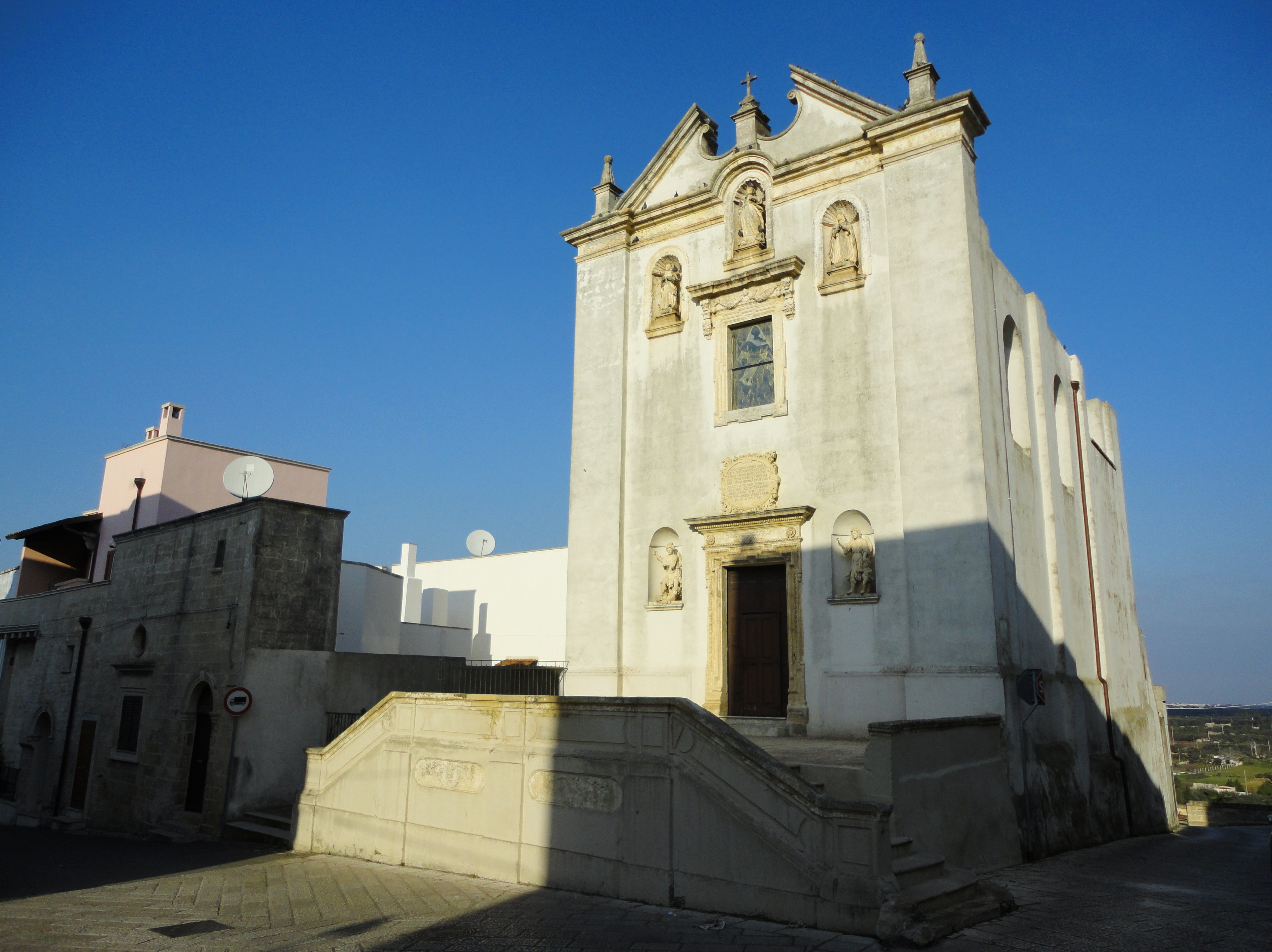 Chiesa dell'Assunta Specchia,Lecce